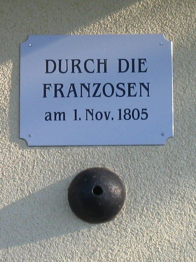 Das Bild zeigt eine Kanonenkugel der Franzosenkriege